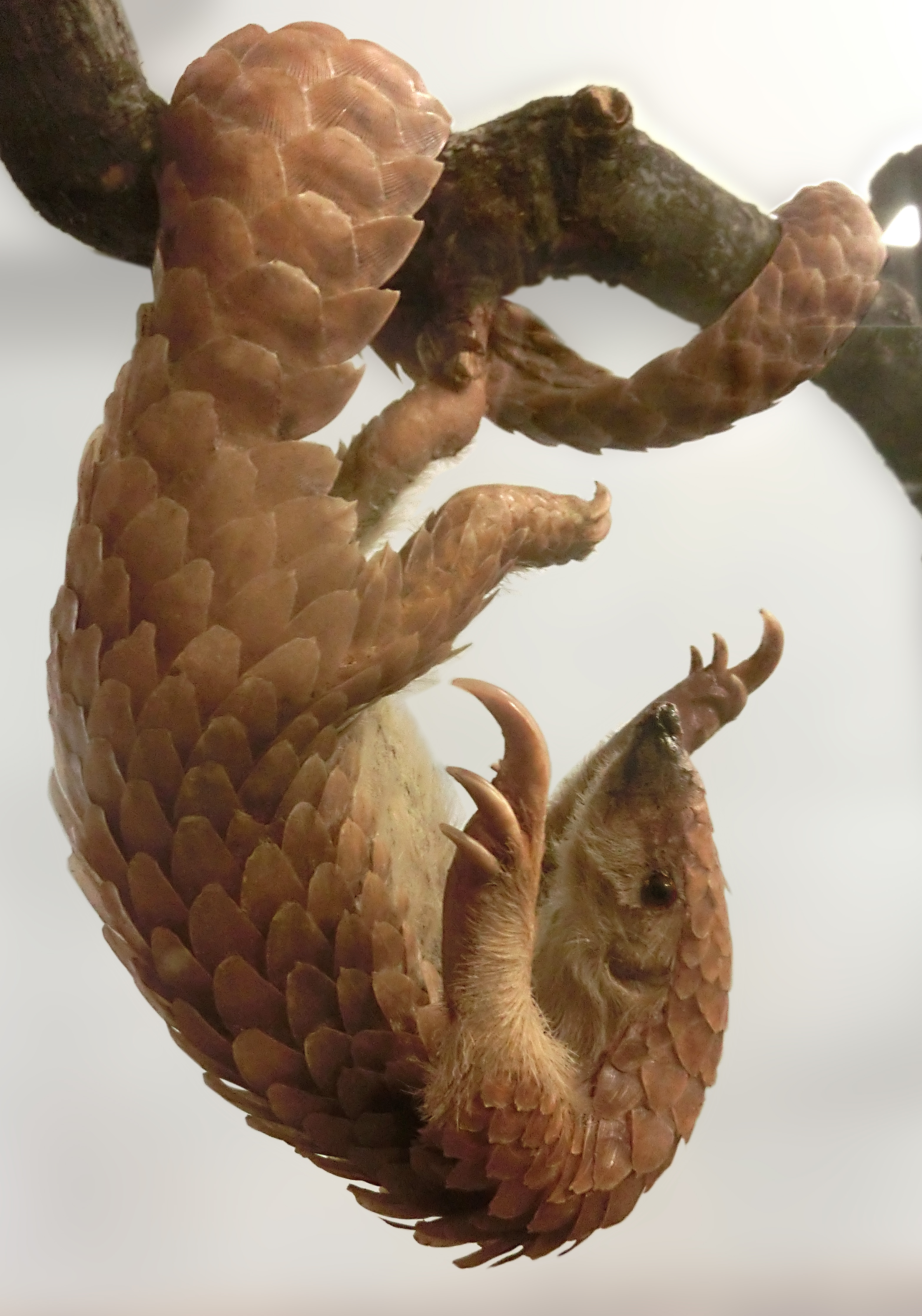 Uppstoppad vitbukig myrkott, Manis tricuspis, från Belgiska Kongo på Göteborgs Naturhistoriska museum, Göteborg, Västra Götaland, Sverige.